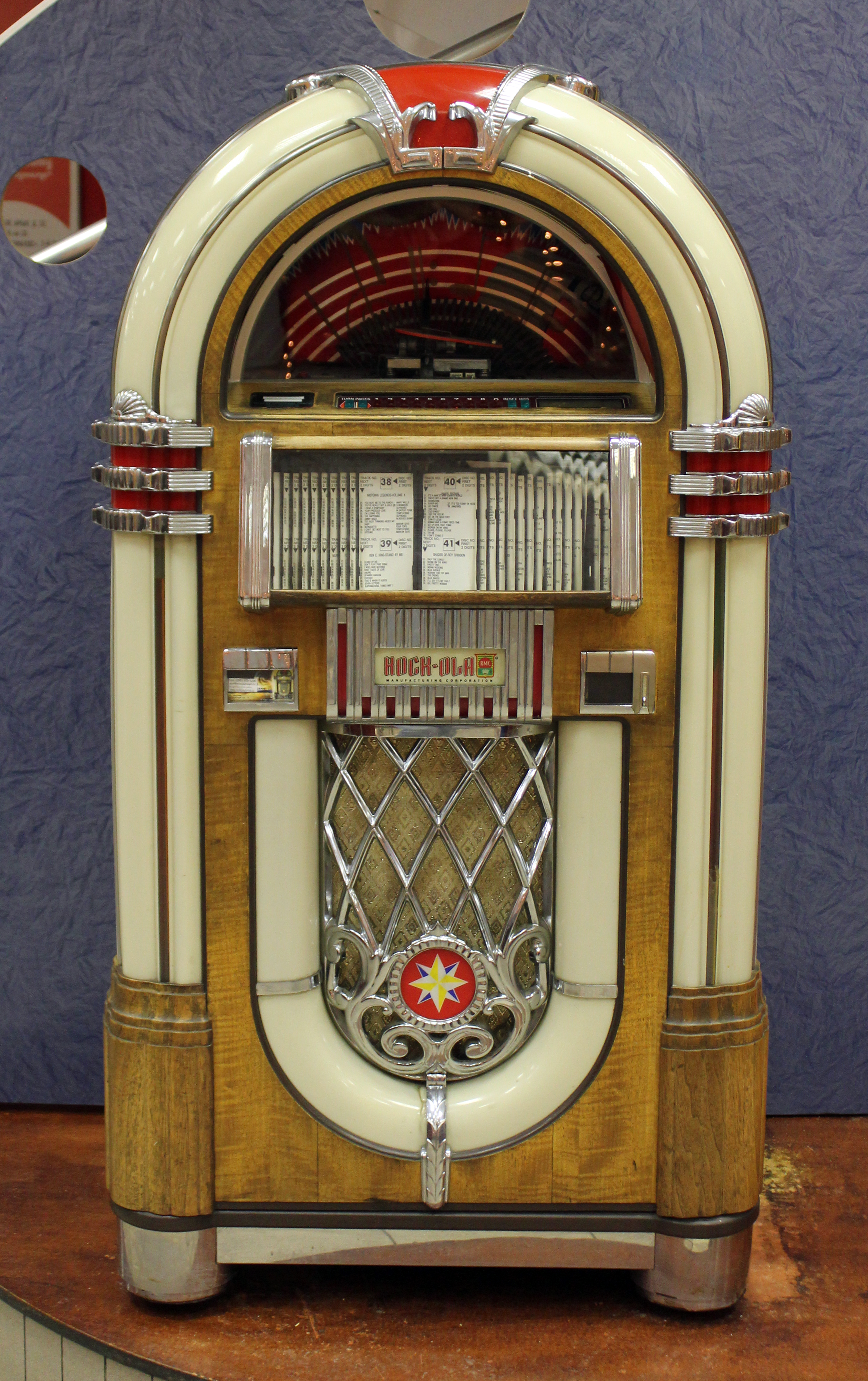 Музыкальный аппарат в МакДоналдсе в Москве